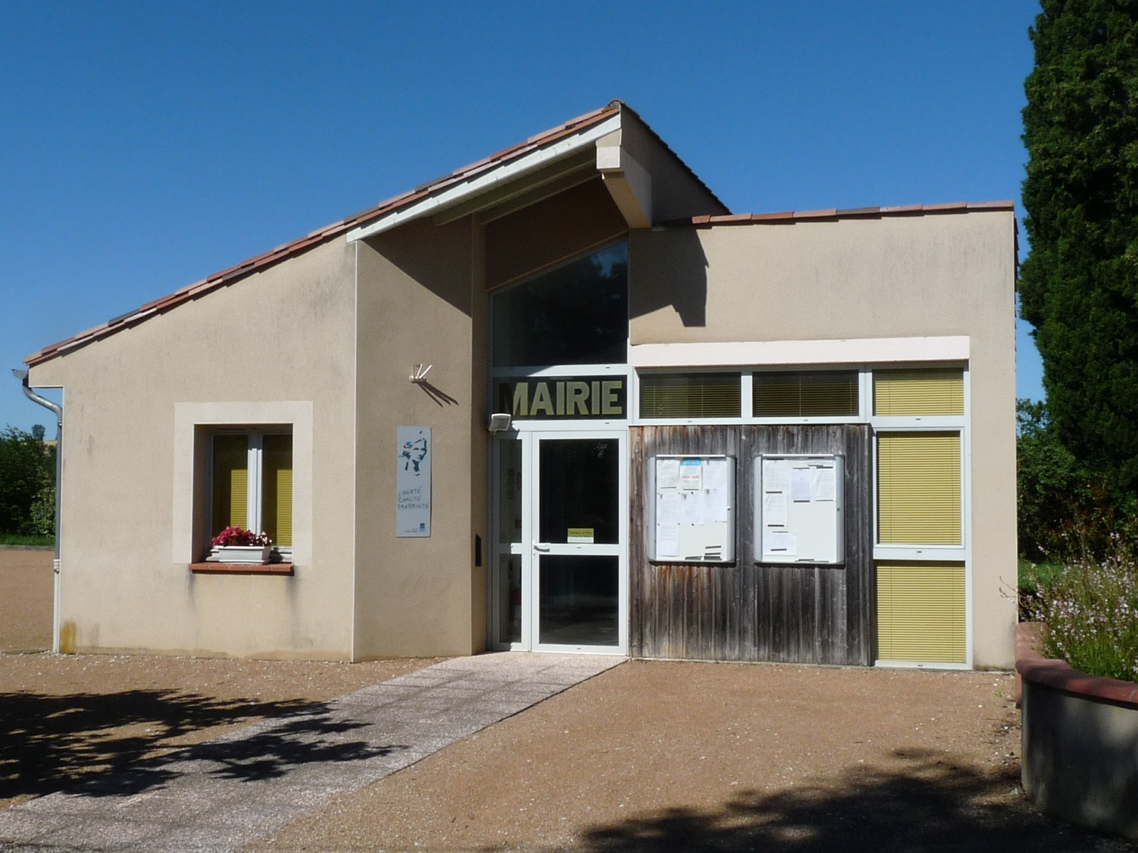 Mairie de Nogaret, Haute-Garonne, France